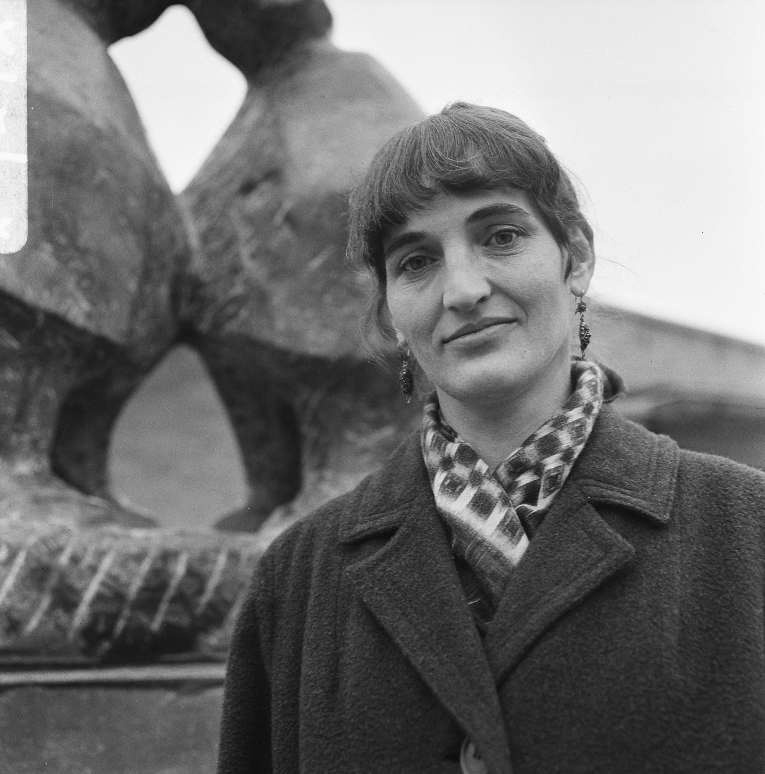 Beeldje De Tweeling van beeldhouwster Nel van Lith onthuld bij GG en GD op Amstelveenseweg.